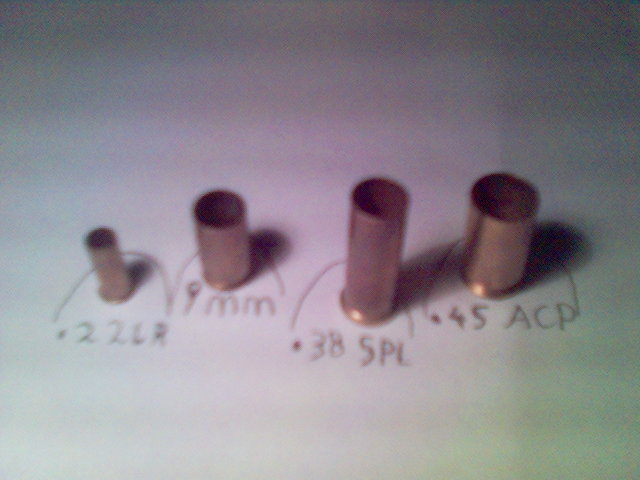 diverse pistool calibers